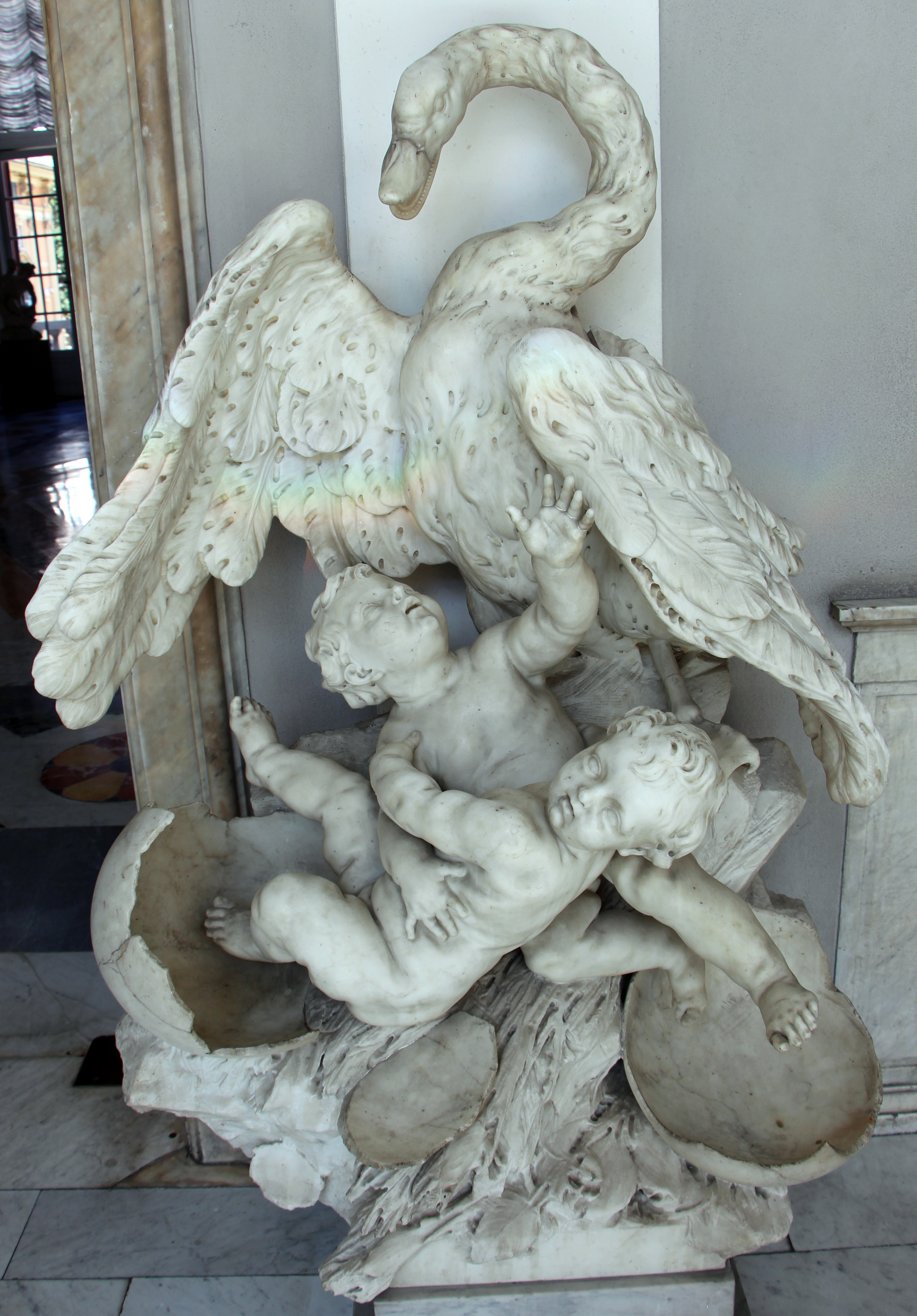 Palazzo Rosso - Musei di Strada Nuova The making of this document was supported by Wikimedia CH. (Submit your project!) For all the files concerned, please see the category Supported by Wikimedia CH. This is a photo of a monument which is part of cultural heritage of Italy.